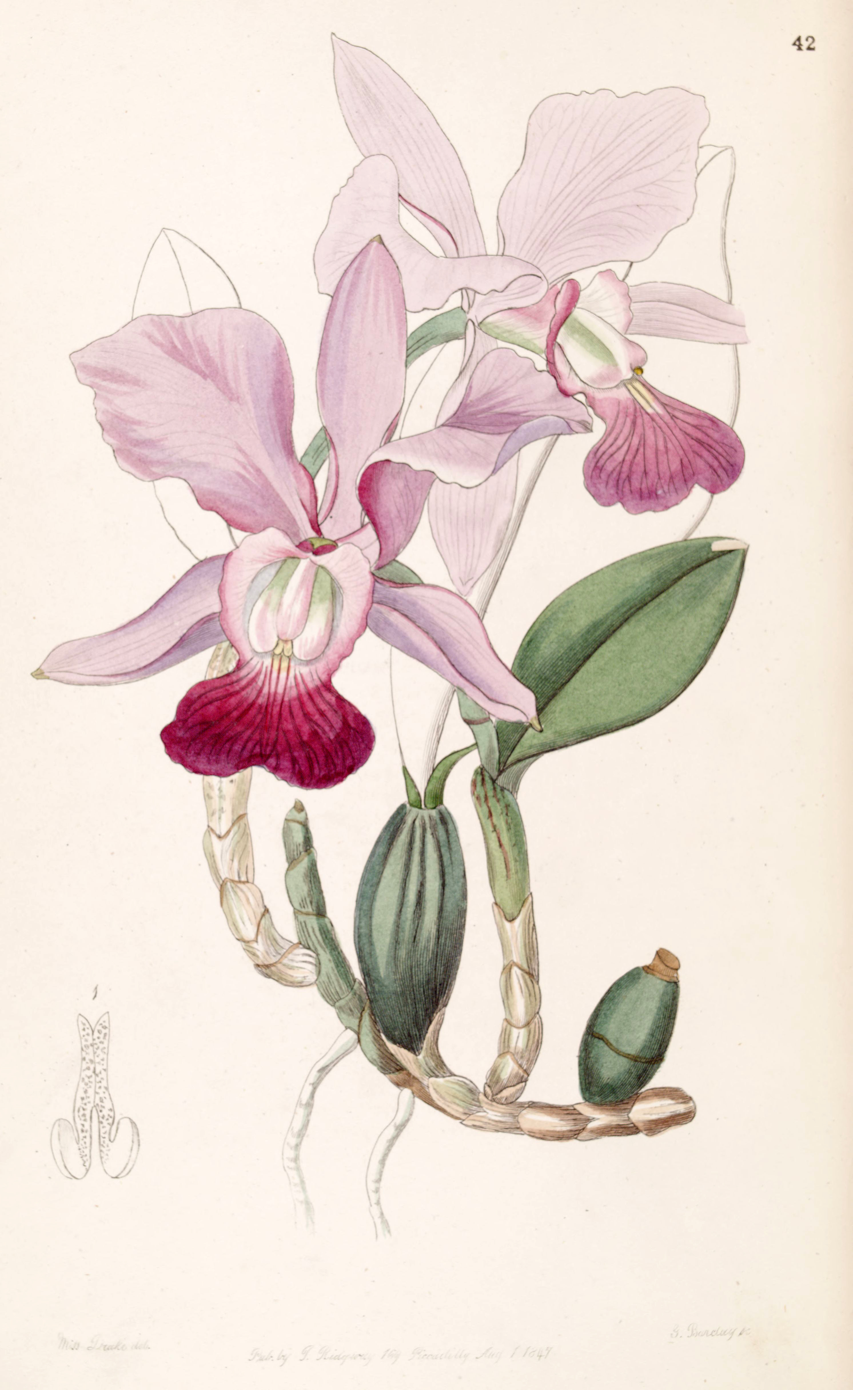 Cattleya walkeriana (as syn. Cattleya bulbosa)